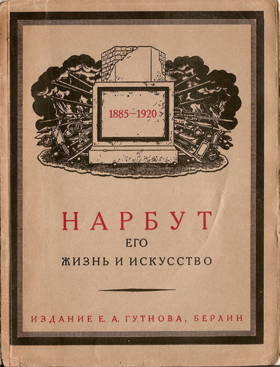 Обложка книги «Нарбут, его жизнь и искусство»